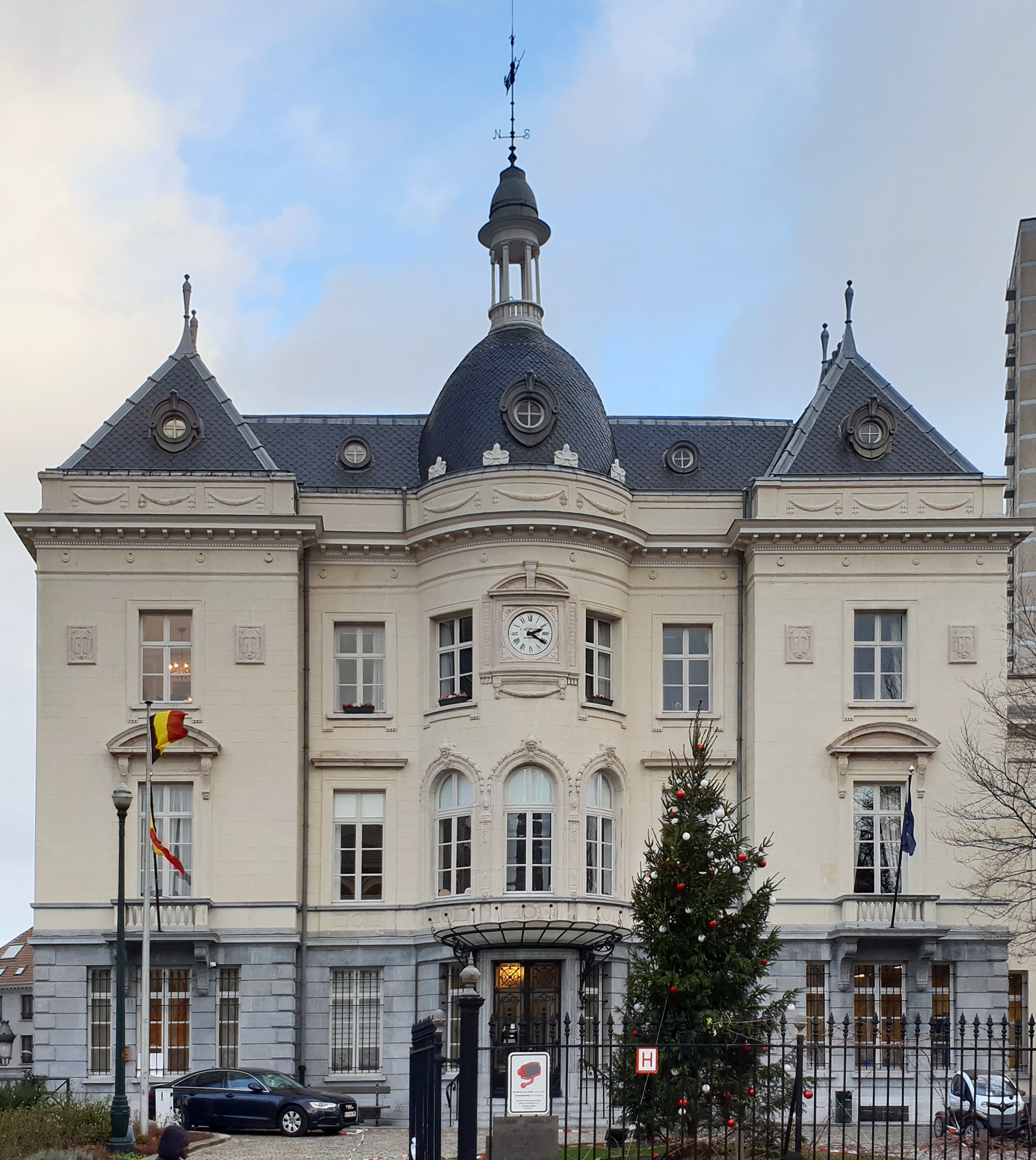 Hotel de Ville